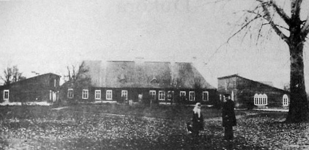 Беларуская (тарашкевіца): Дудзічы (Dudzičy), сядзіба Ельскіх (Jelski)